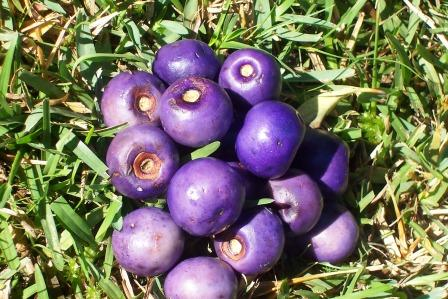 Gmelina leichhardtii fruit